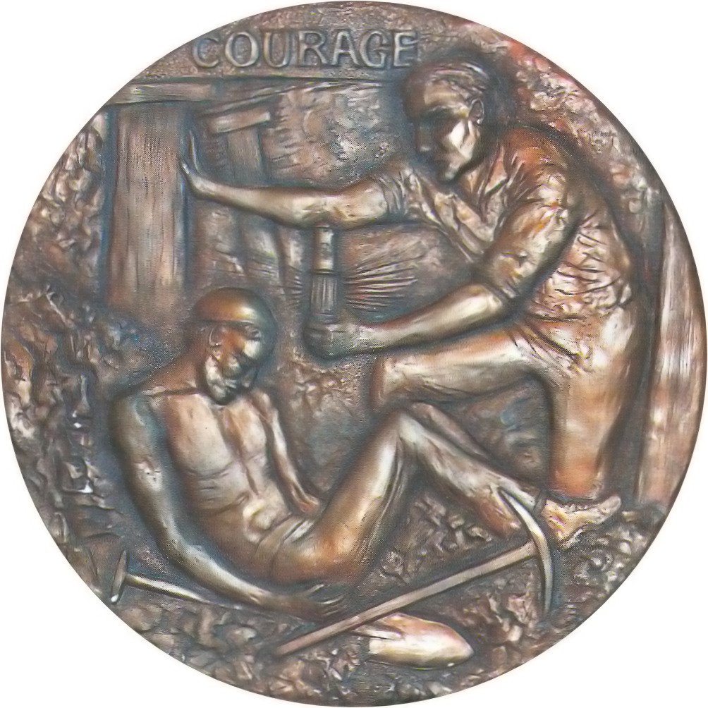 medaille Edward Medal Industry